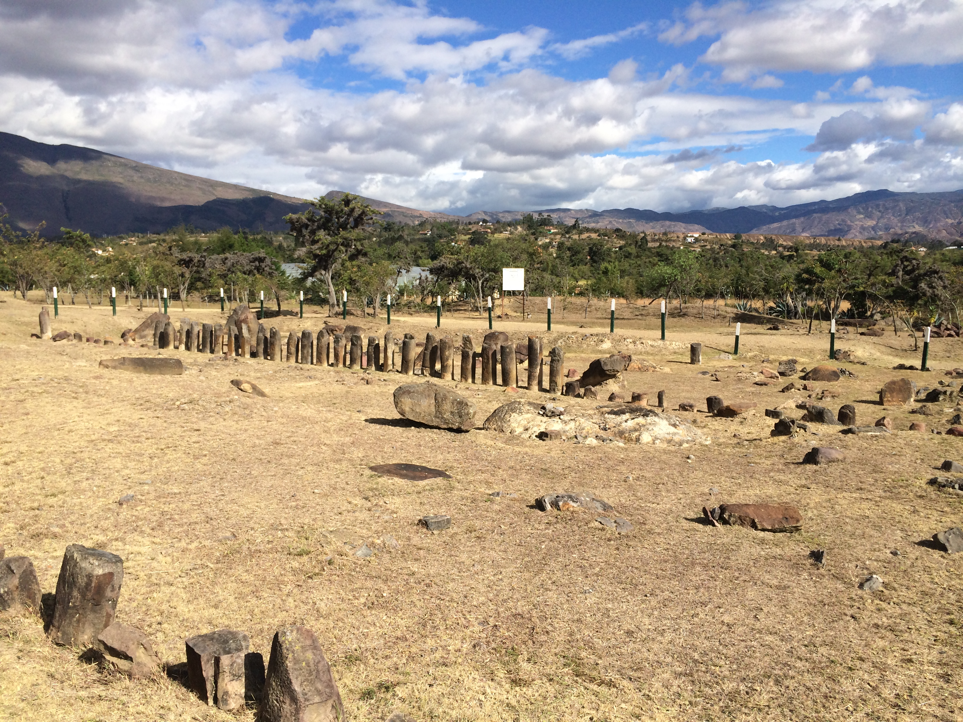 Piedras del calendario Muisca en Villa de Leyva